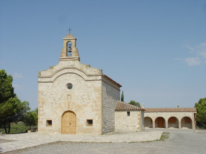 Ermita de Sant Jordi de Faió